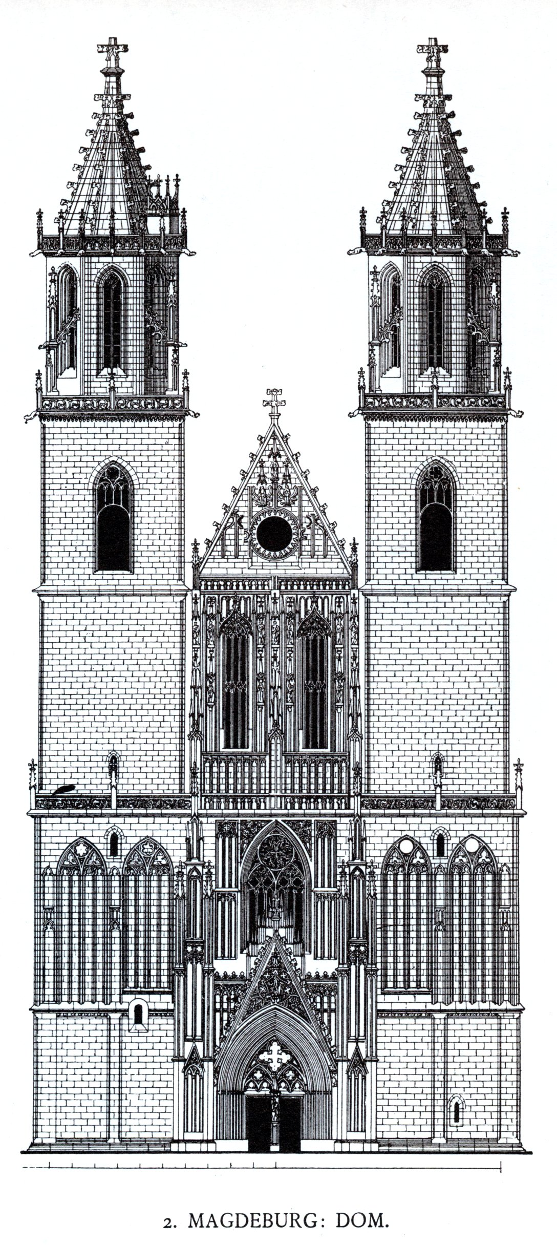 Dom zu Magdeburg